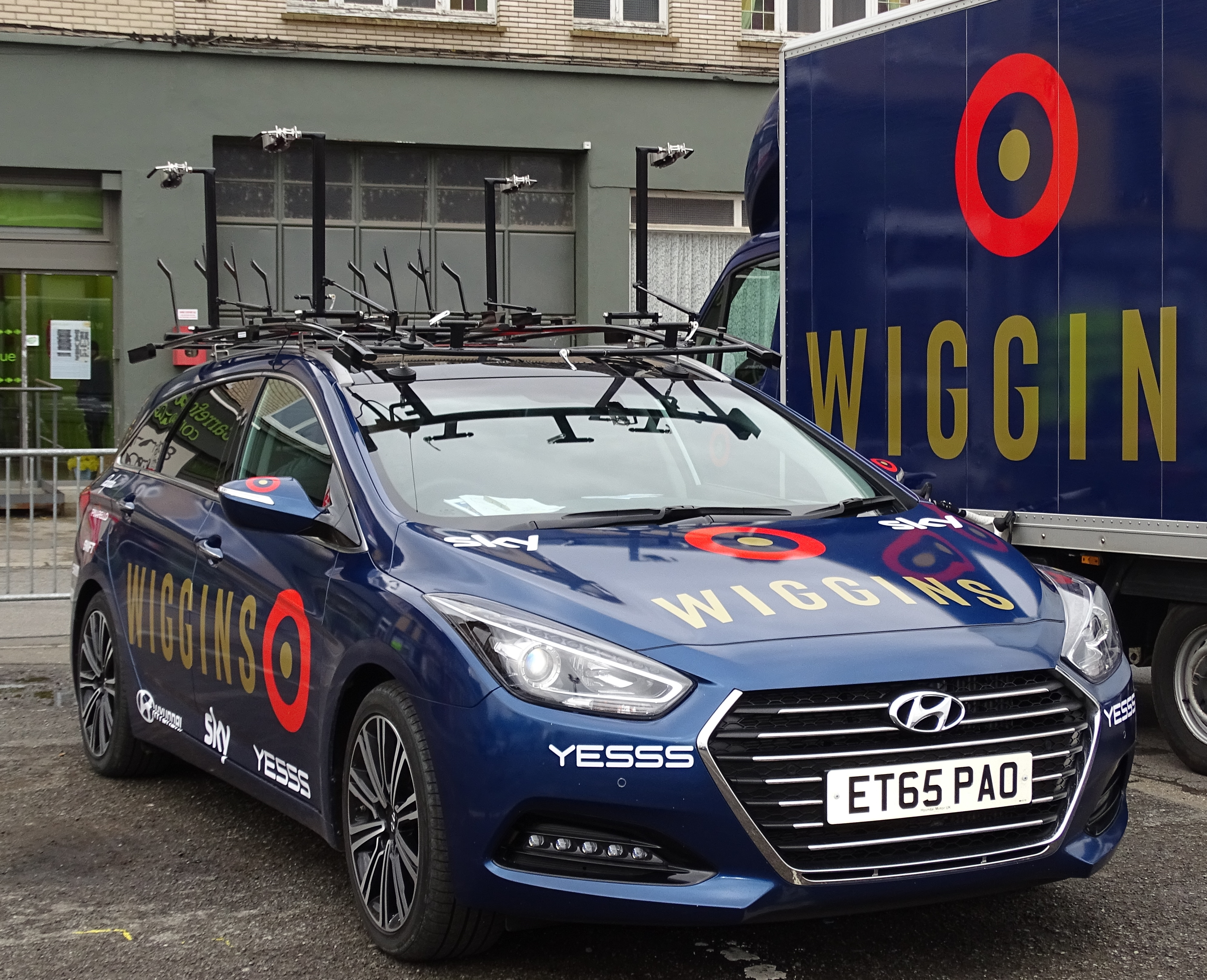 Reportage réalisé le dimanche 6 mars à l'occasion du départ et de l'arrivée du Grand Prix de Lillers-Souvenir Bruno Comini 2016 à Lillers, Pas-de-Calais, Nord-Pas-de-Calais, France.